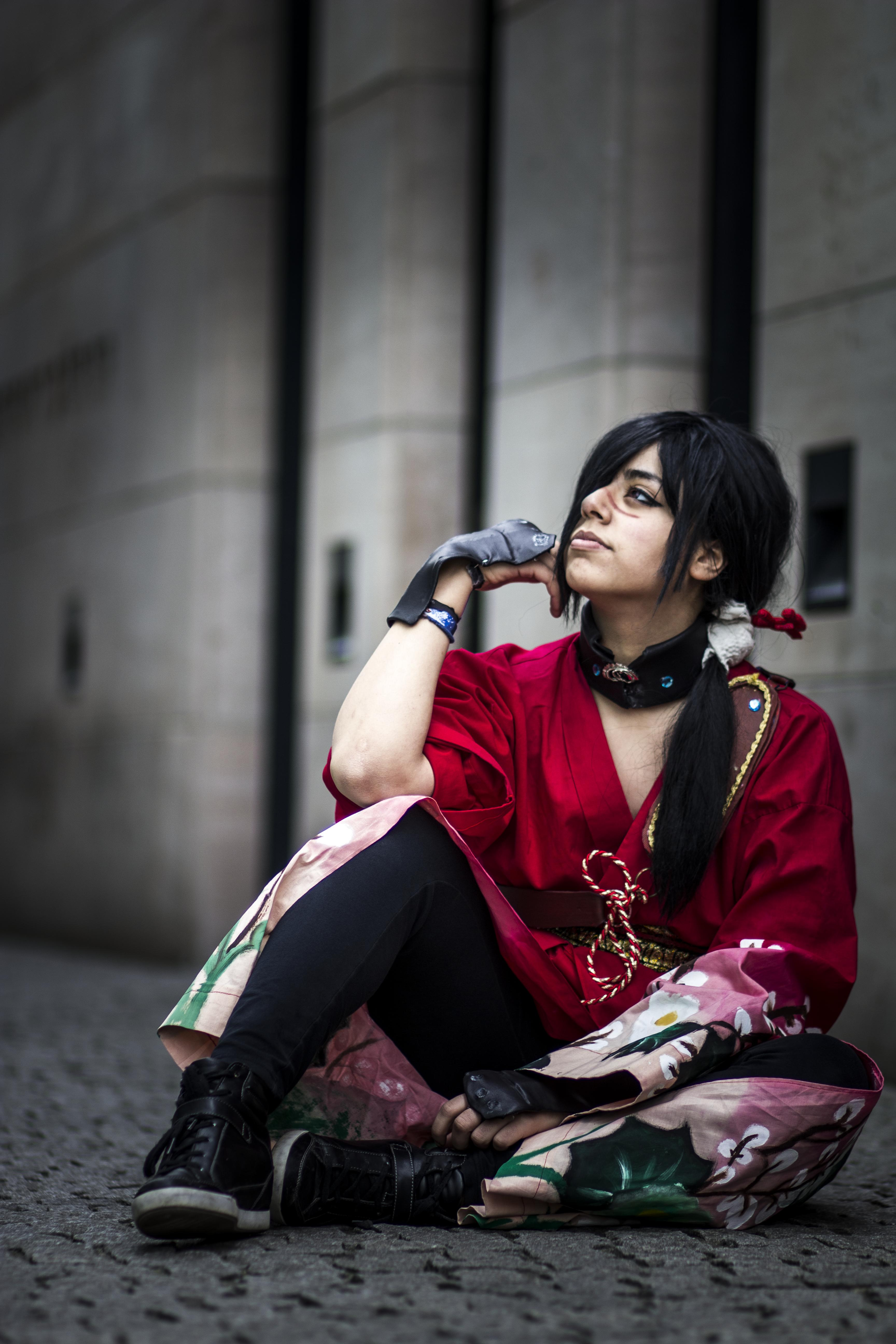 Koujaku